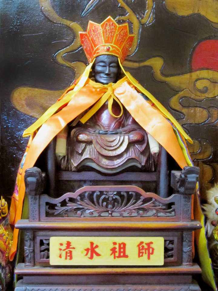 正德宮清水祖師公